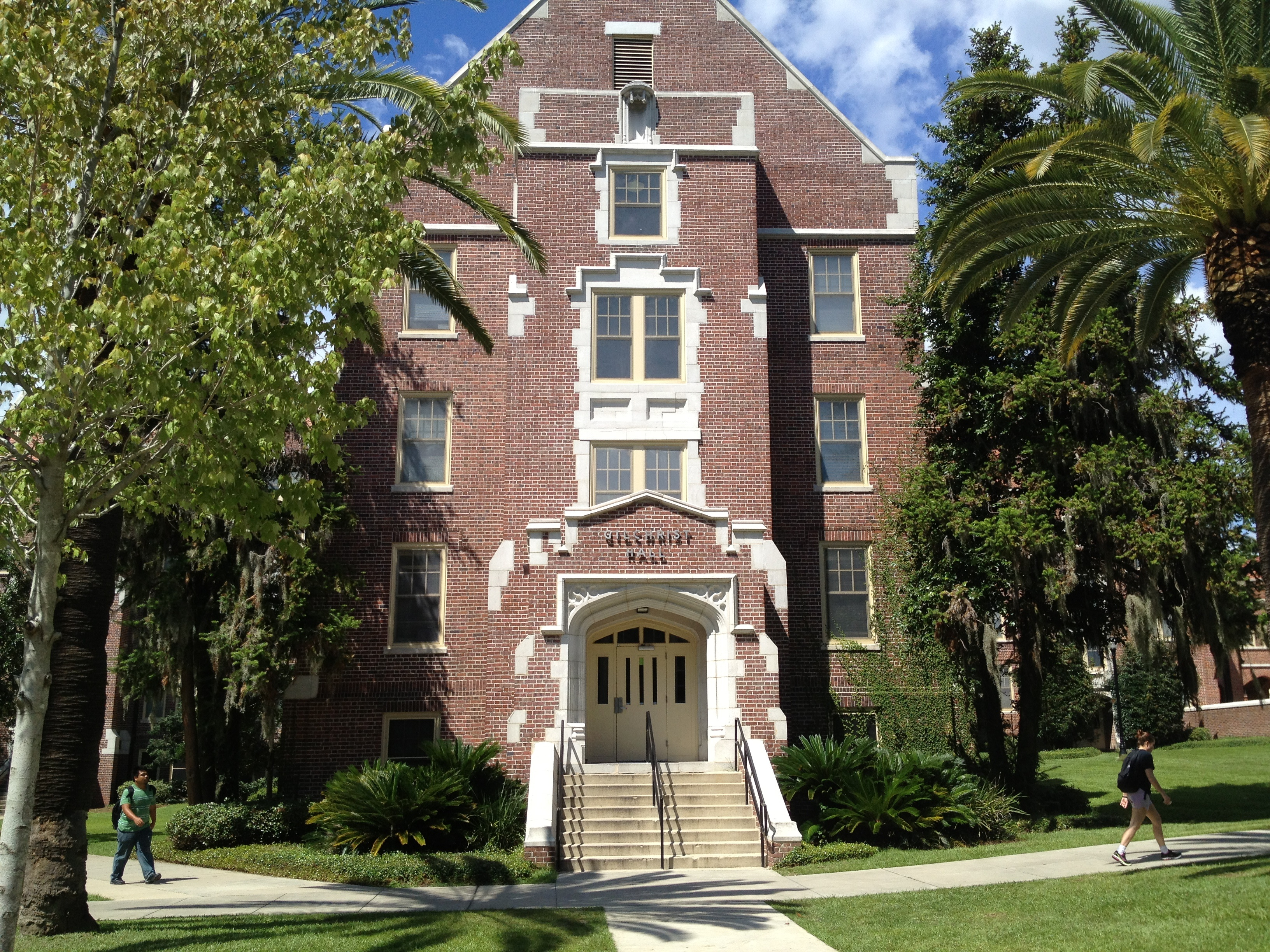 Gilchrist Hall FSU